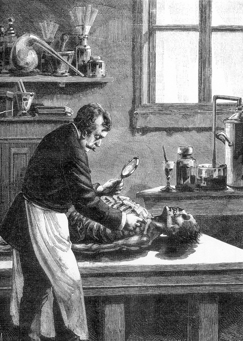 Le docteur Lacassagne examine de nouveau le larynx de Gouffé, illustration de l'ouvrage La malle sanglante : assassinat de l'huissier Gouffé, affaire Eyraud et Gabrielle Bompard par Jules de Grandpré, Paris, A. Fayard, 1890.